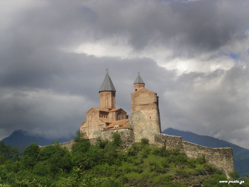 Gremi castle, Georgia